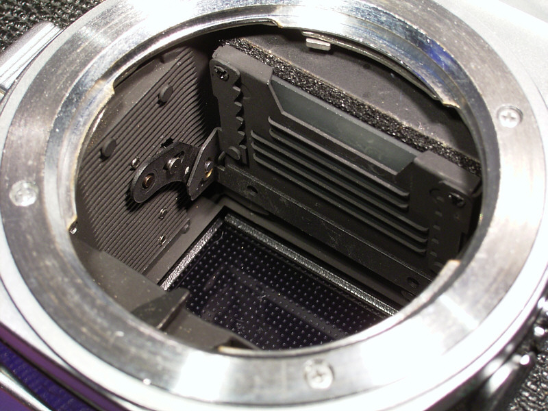 Spiegelkasten einer Kleinbild-Spiegelreflexkamera (Minolta srT303b) mit mattschwarzer Lackierung und Verrippungen zur Veminderung unerwünschter Reflexionen. Schwingspiegel arretiert, Verschluss geöffnet, im Hintergrund ist die Filmandruckplatte sichtbar.